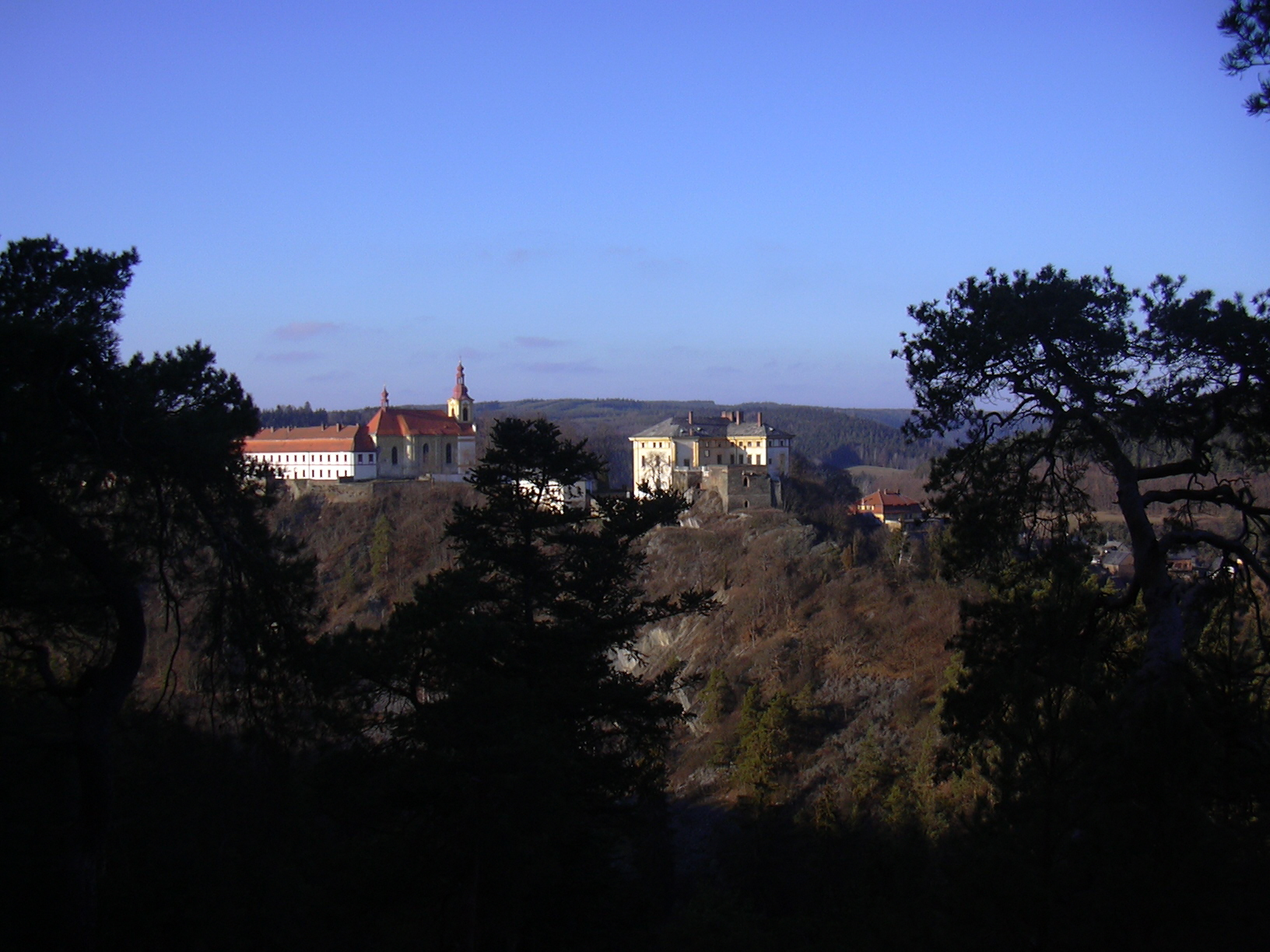 Pohled na kostel a zámek v Rabštejně nad Střelou ze skalního ostrohu Hraběcí vyhlídka